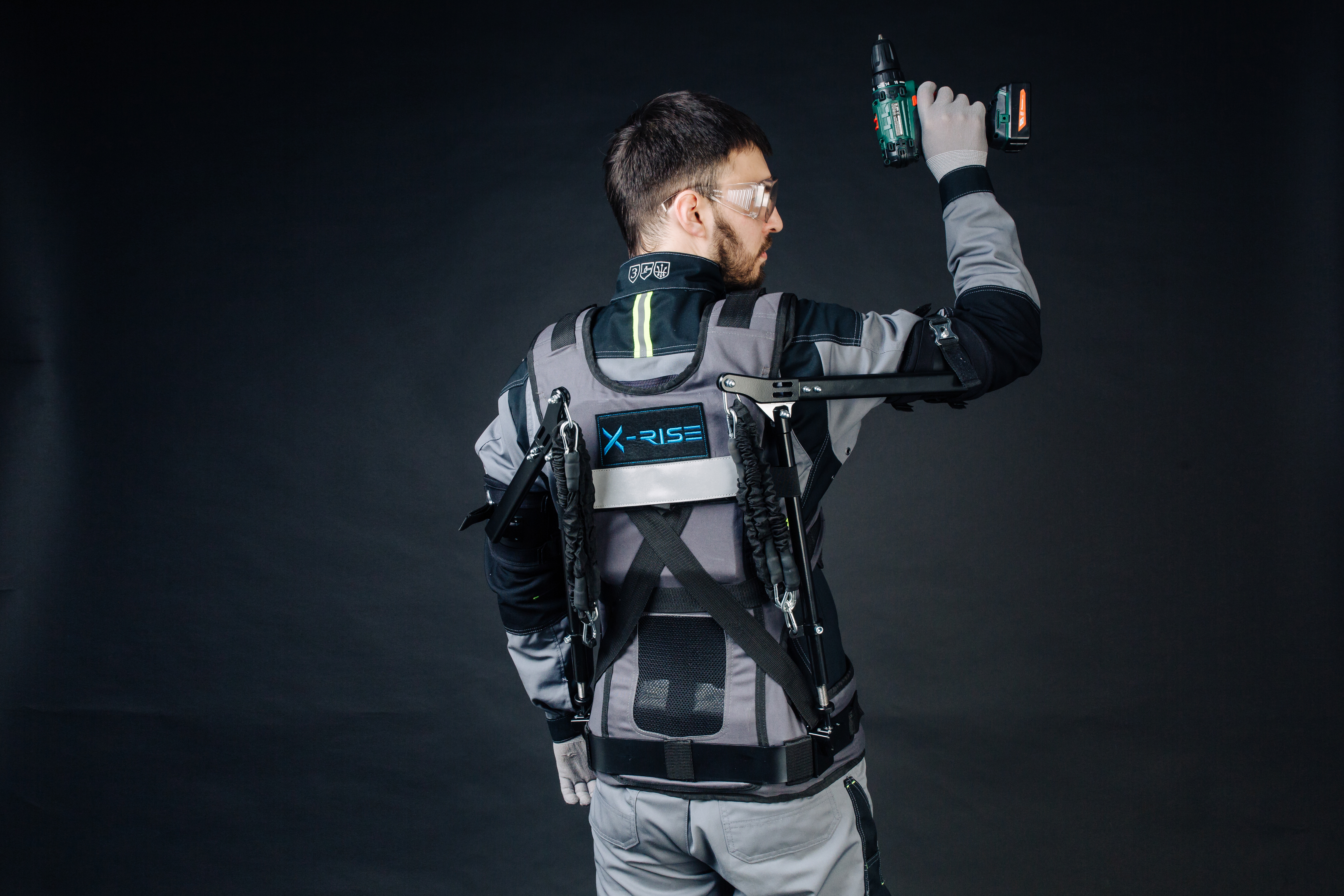 промышленный пассивный экзоскелет X-RISE для поддержки рук